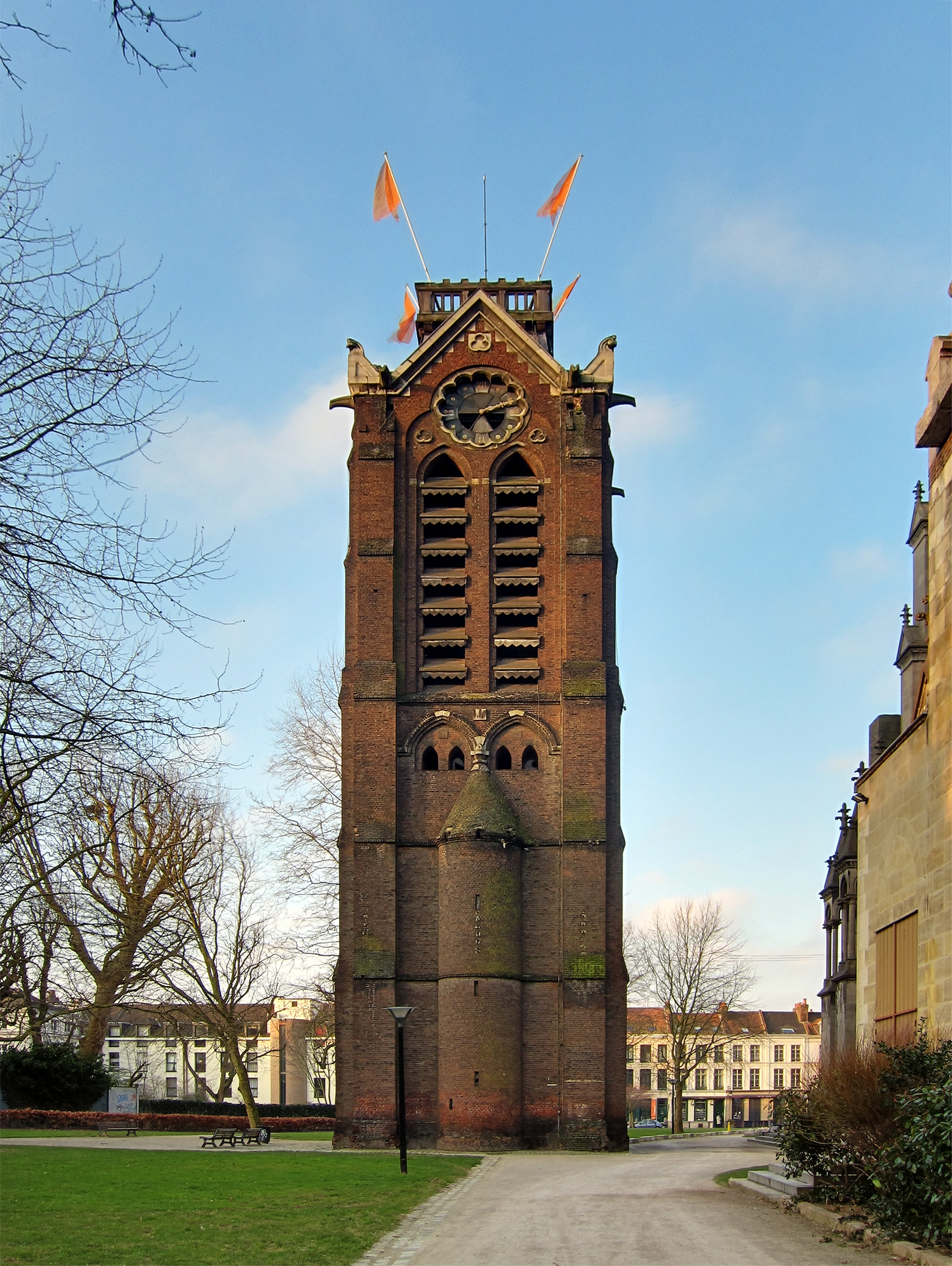 Le campanile de la Cathédrale Notre-Dame-de-la-Treille à Lille.